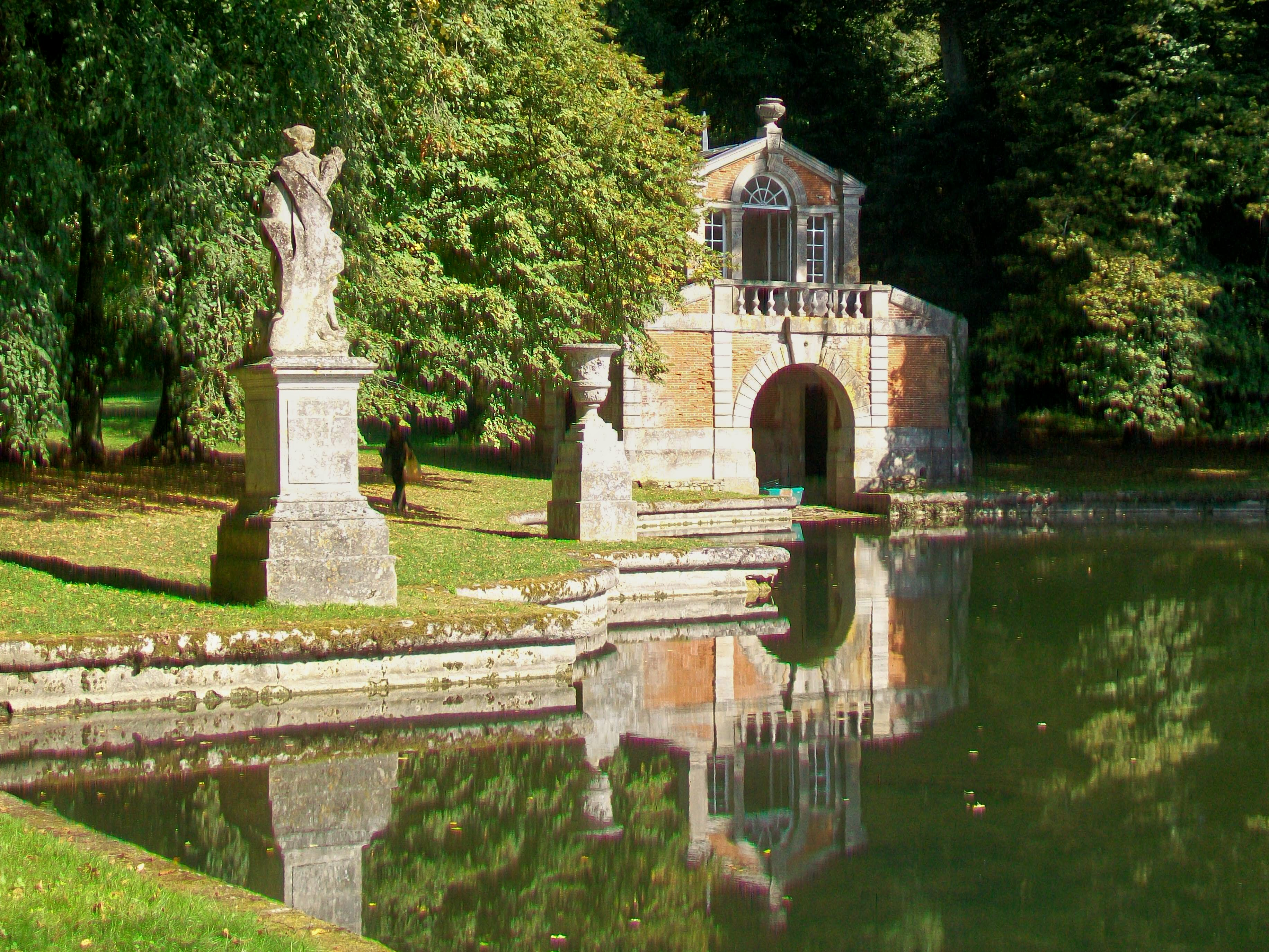 L'embarcadère à l'extrémité nord du grand miroir d'eau.